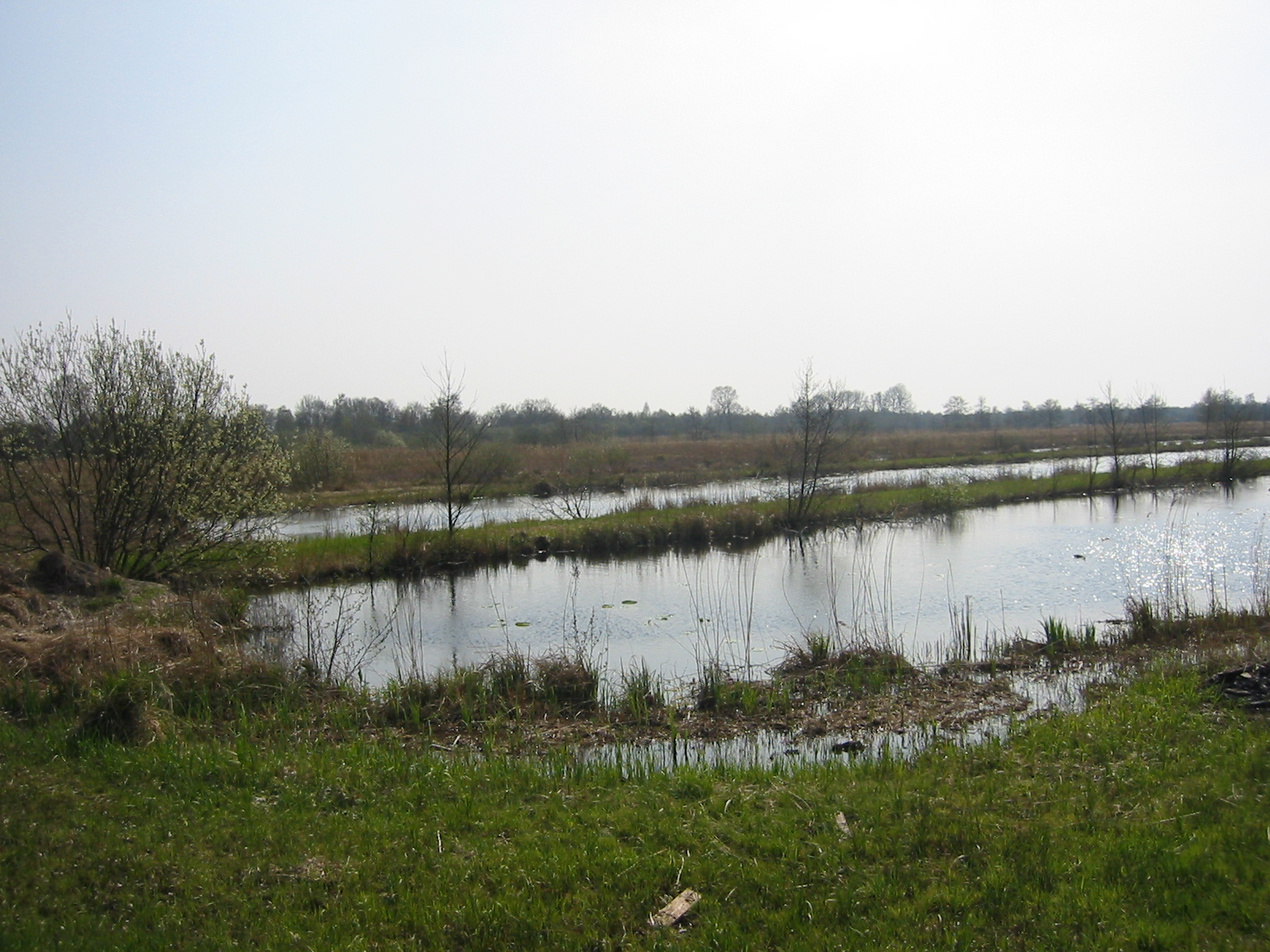 eigen foto. GerardM 15 apr 2004 18:11 (CEST)